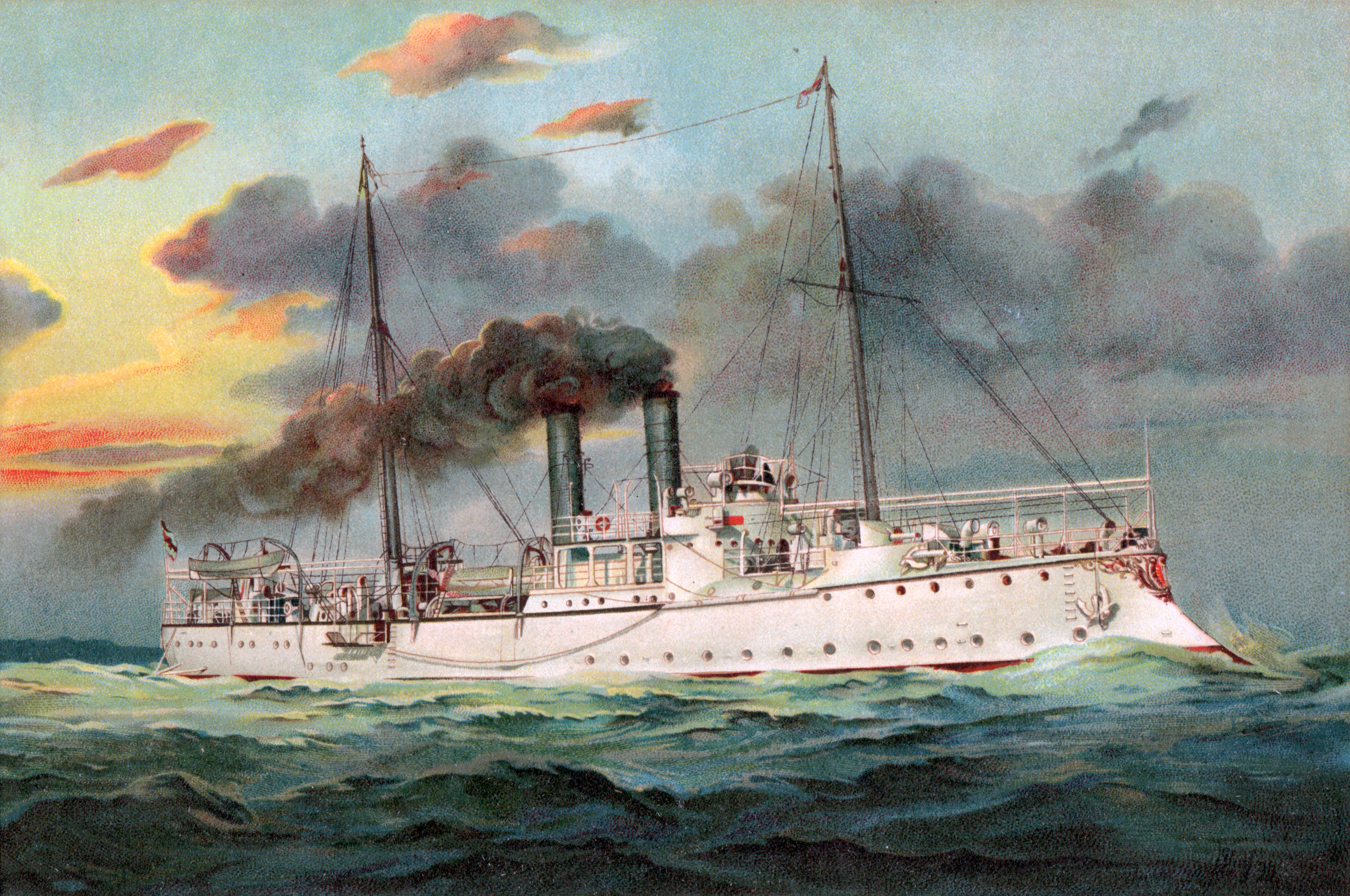 S.M. Kanonenboot Jaguar